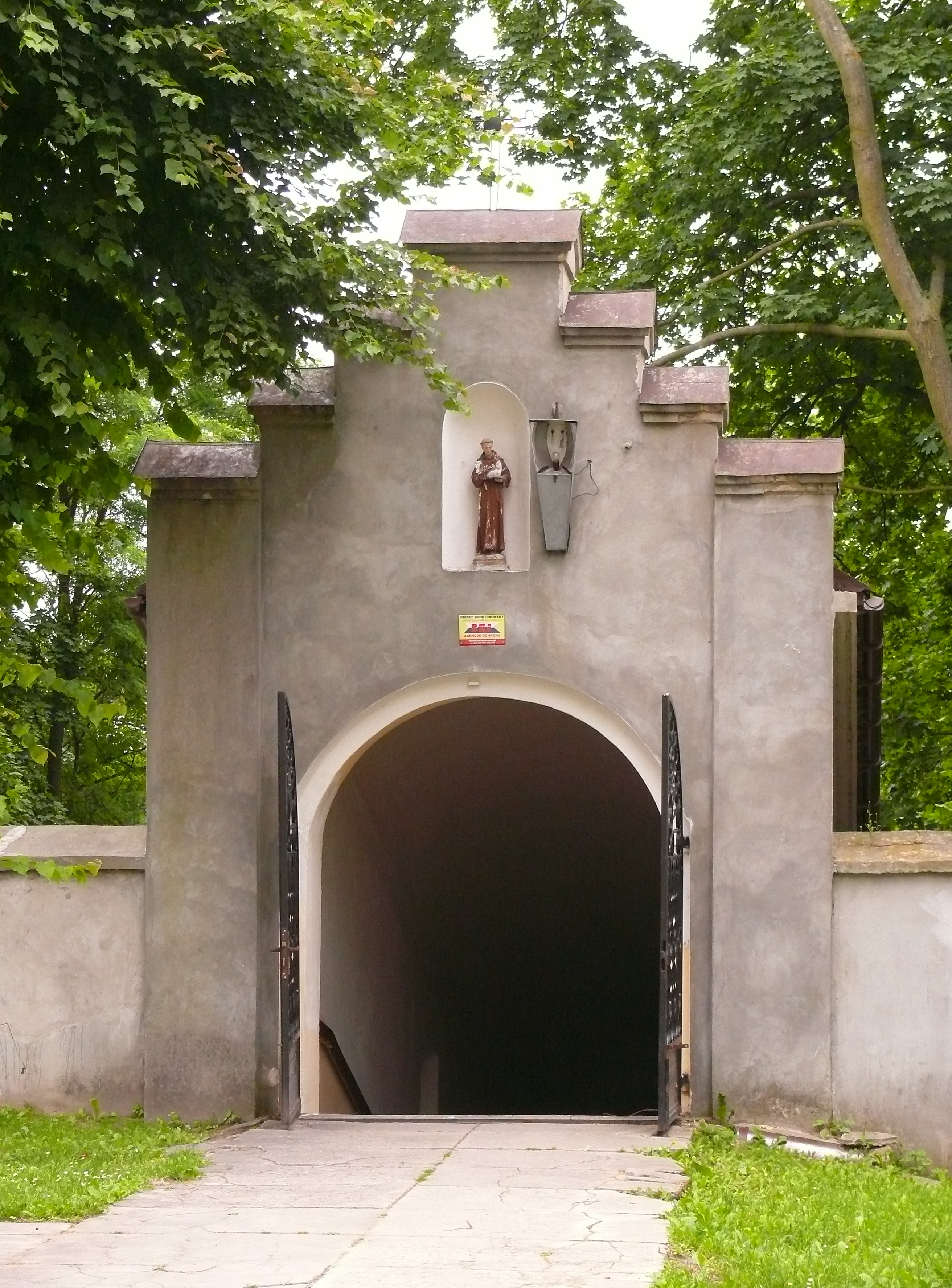 Brama wejściowa na dziedziniec kościoła p.w. Św. Antoniego Padewskiego w Radecznicy - nr w rej. zabytków A/187 z 27.07.1978